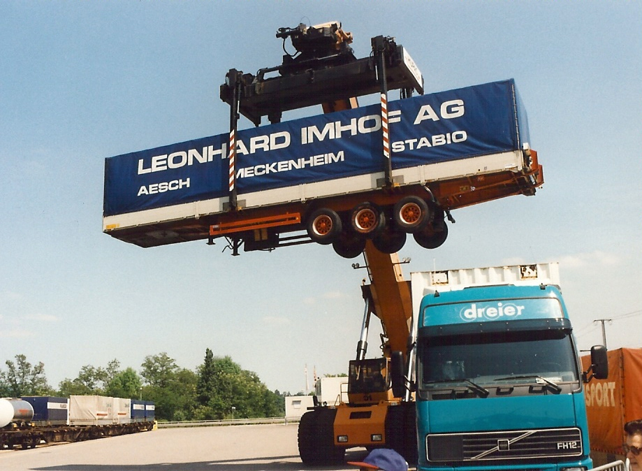 Sattelauflieger angehoben für Bahnverlad